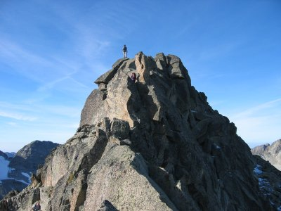 Pico Gran Quairat . Cima. Esta imagen ha sido tomada personalmente por Avh